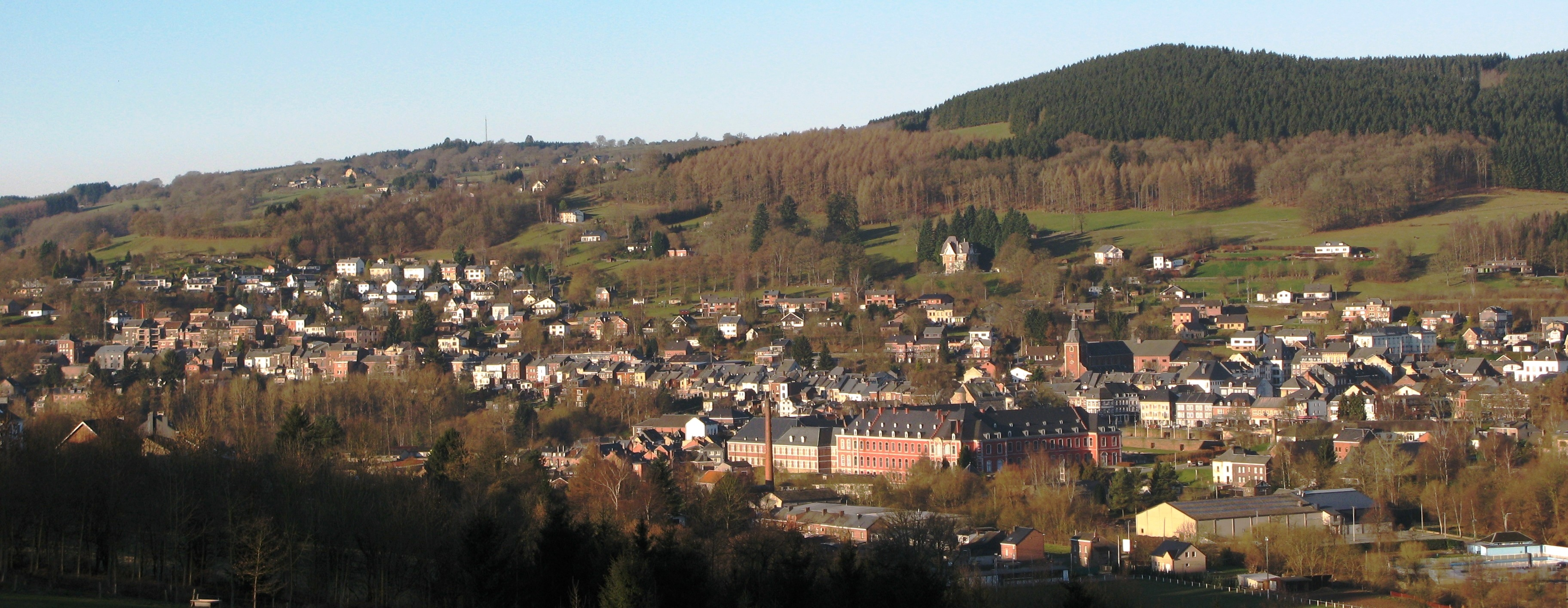 Stavelot vum Chemin du Château aus gesinn. Dezember 2008.